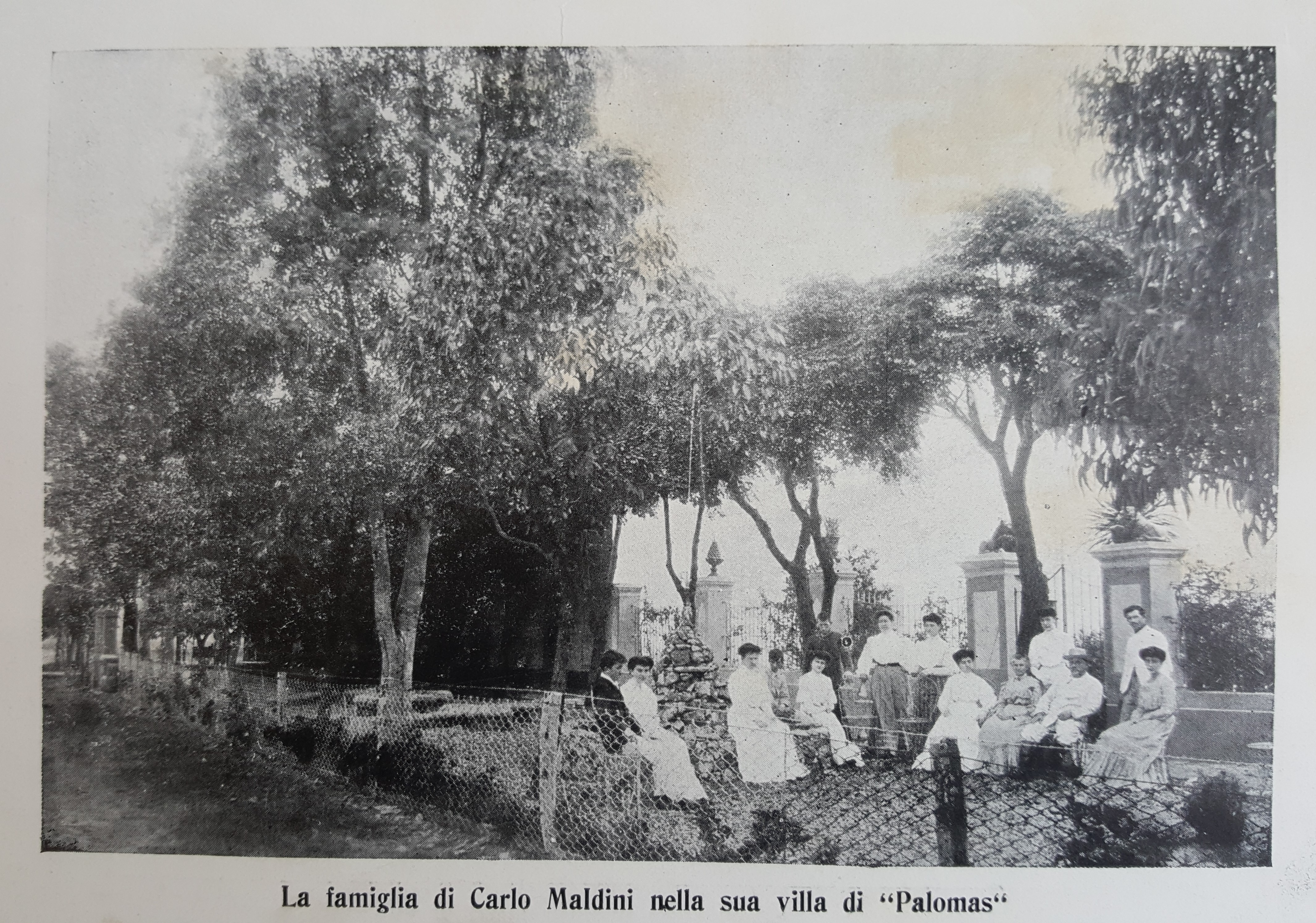 La famiglia di Carlo Maldini nella casa di Palomas (Salto, Uruguay)